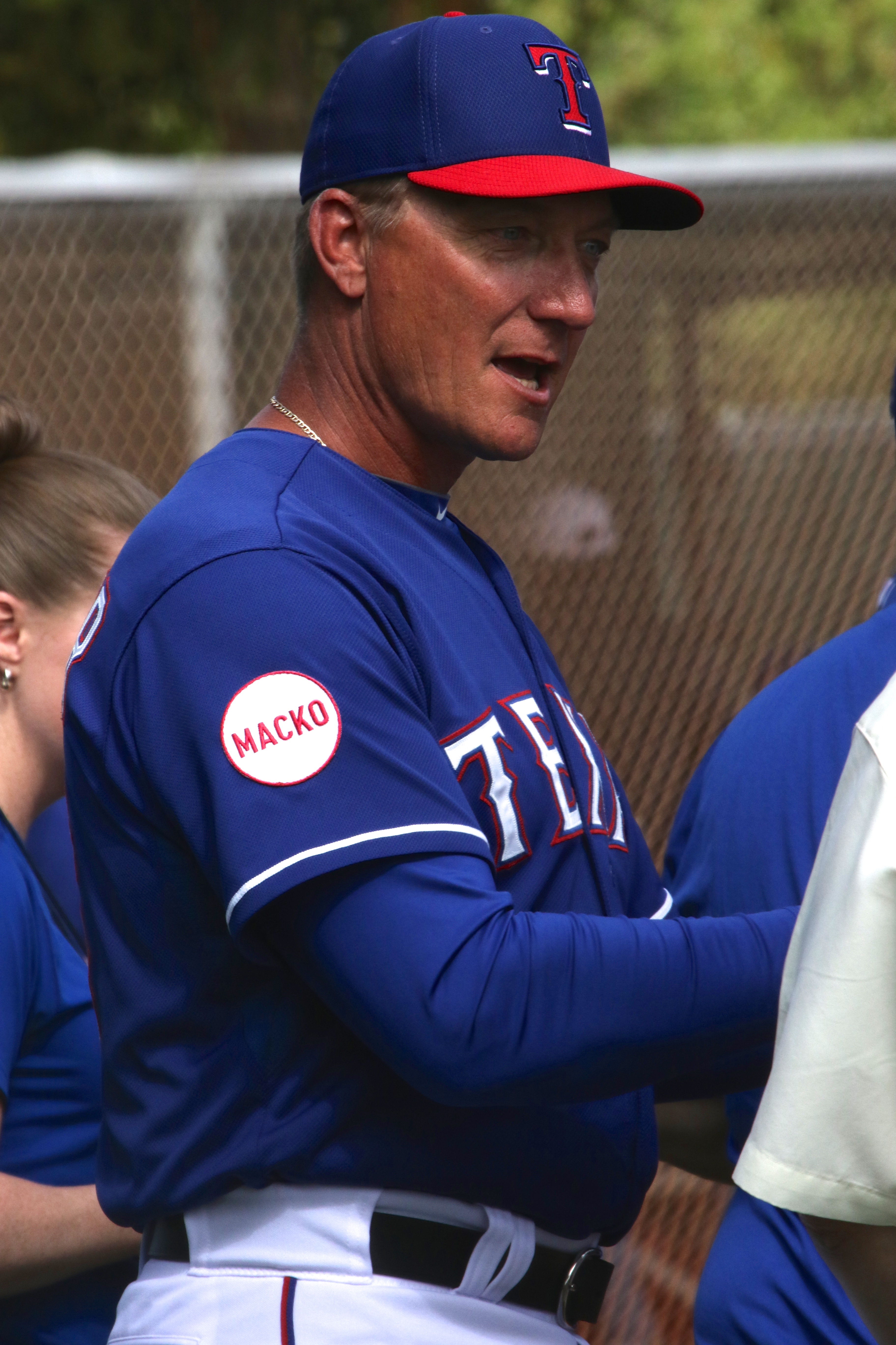 Jeff Banister Texas Rangers